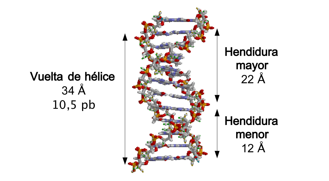 Hendiduras mayor y menor de la doble hélice de ADN (major and minor grooves from double helix of DNA)